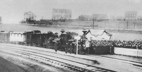 Eröffnungszug der umgebauten Windbergbahn in Hänichen-Goldene Höhe